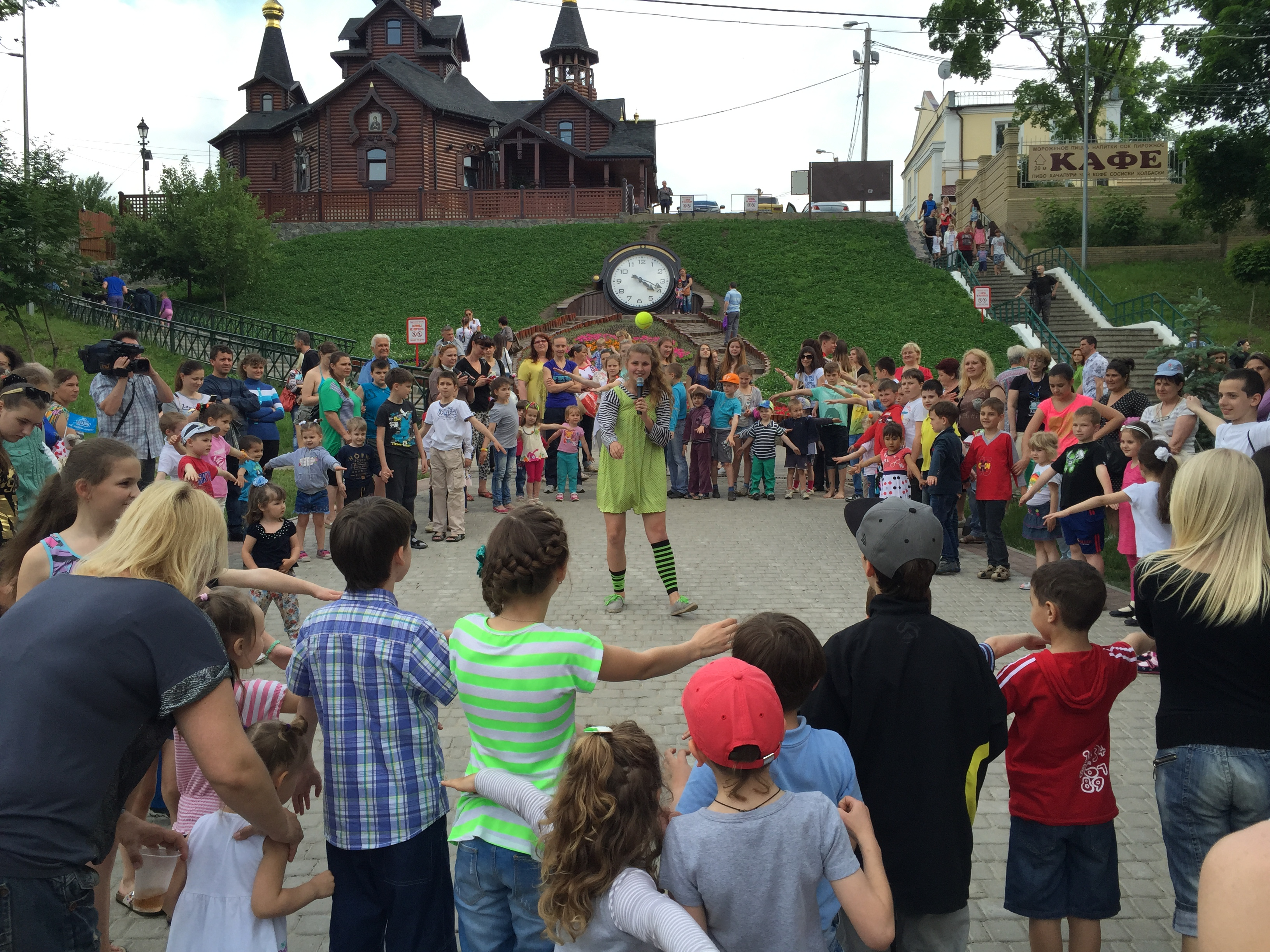 Волонтери «Станції Харків» організували свято на День захисту дітей для дітей ВПО